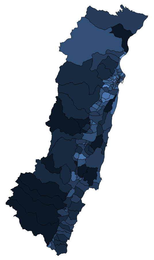 顏色對照表